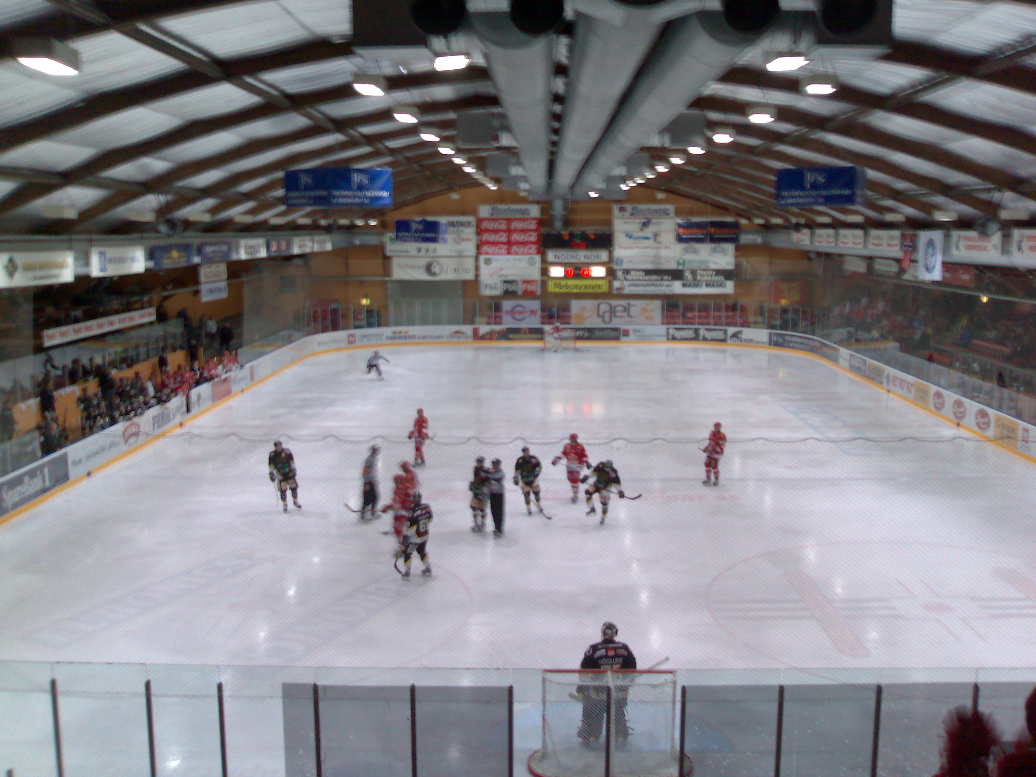 Stjernen vs Stavanger Oilers in Stjernehallen